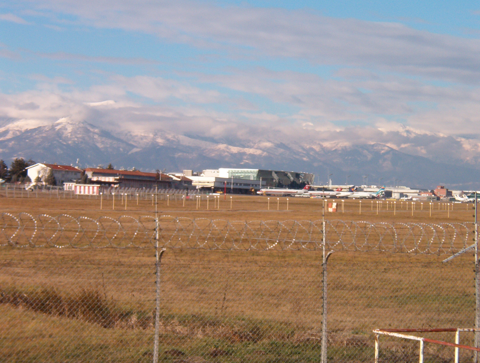 Aeroporto di Caselle - Provincia di Torino - Italy